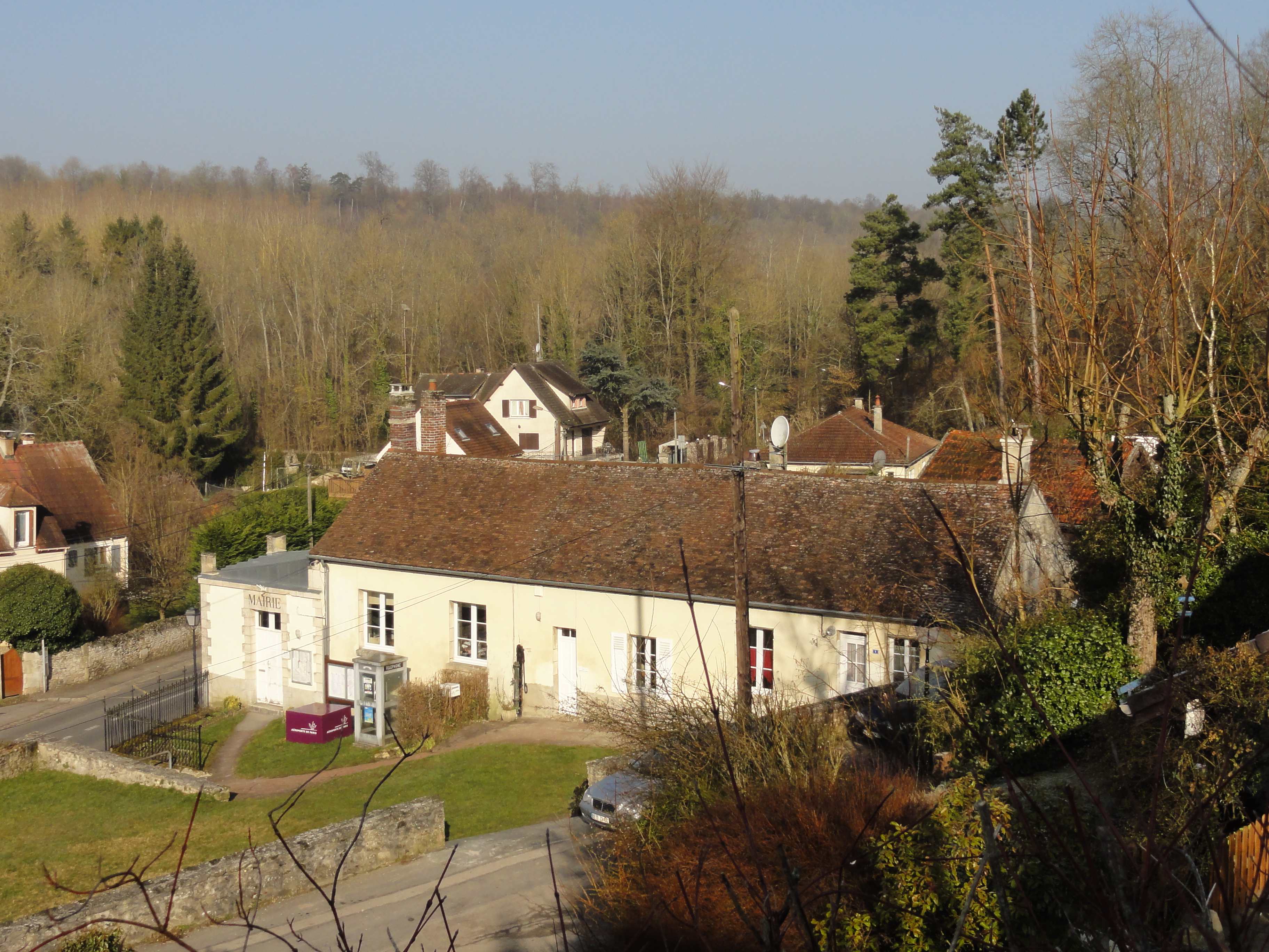 La mairie-école, entre le chemin des Écoliers et la rue Robert-Ruegg.